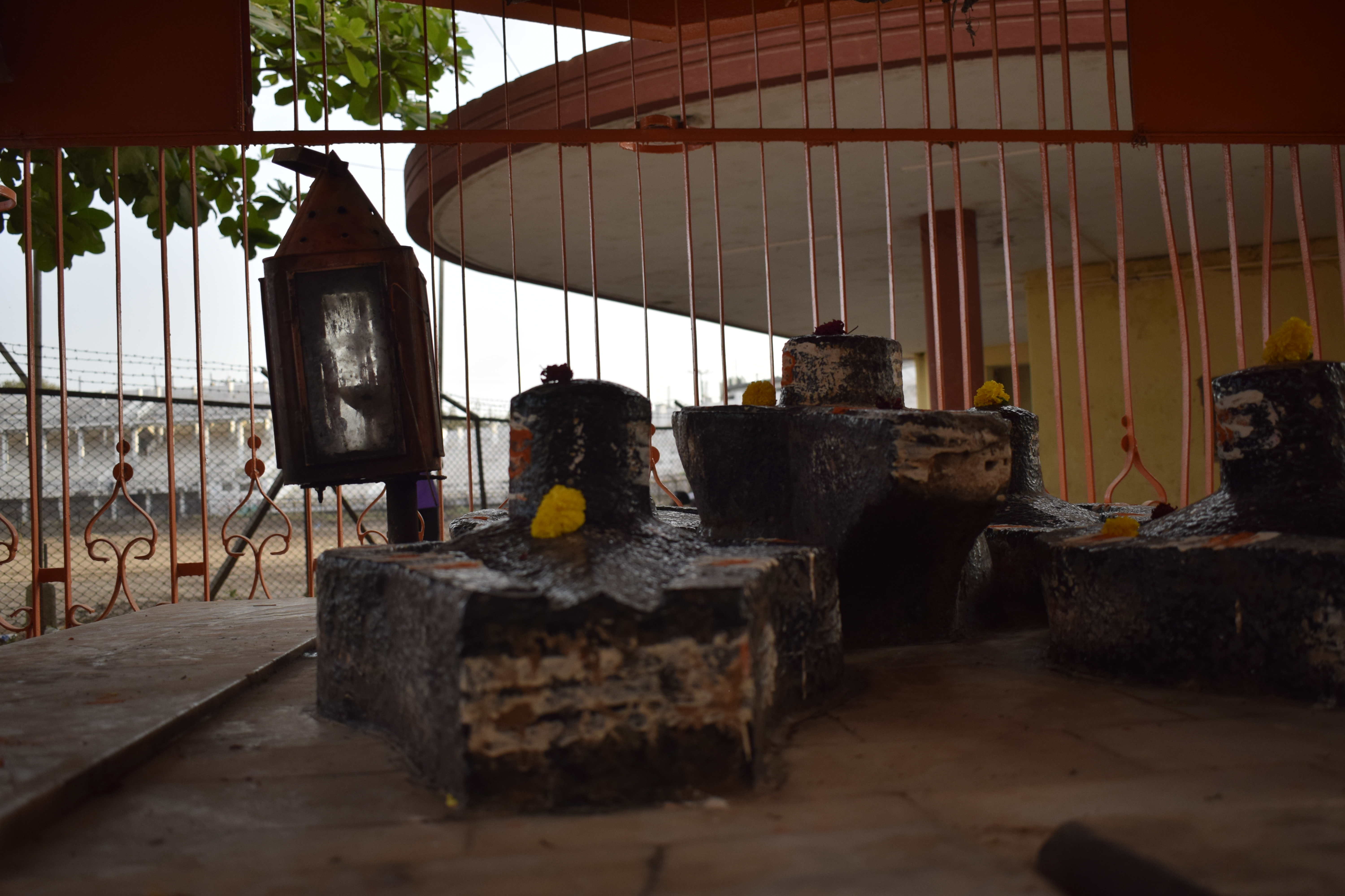 श्री वज्रेश्वर लिंग